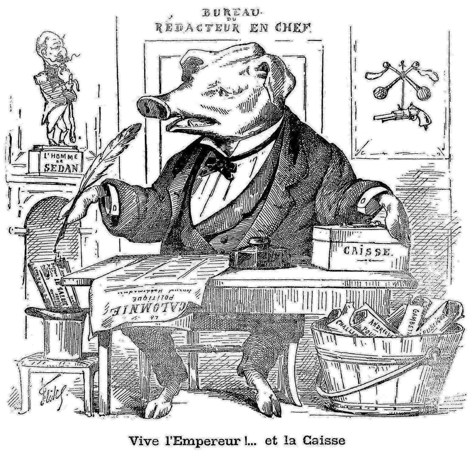 Caricature d'Adolphe Ponet, rédacteur en chef de la Comédie politique.